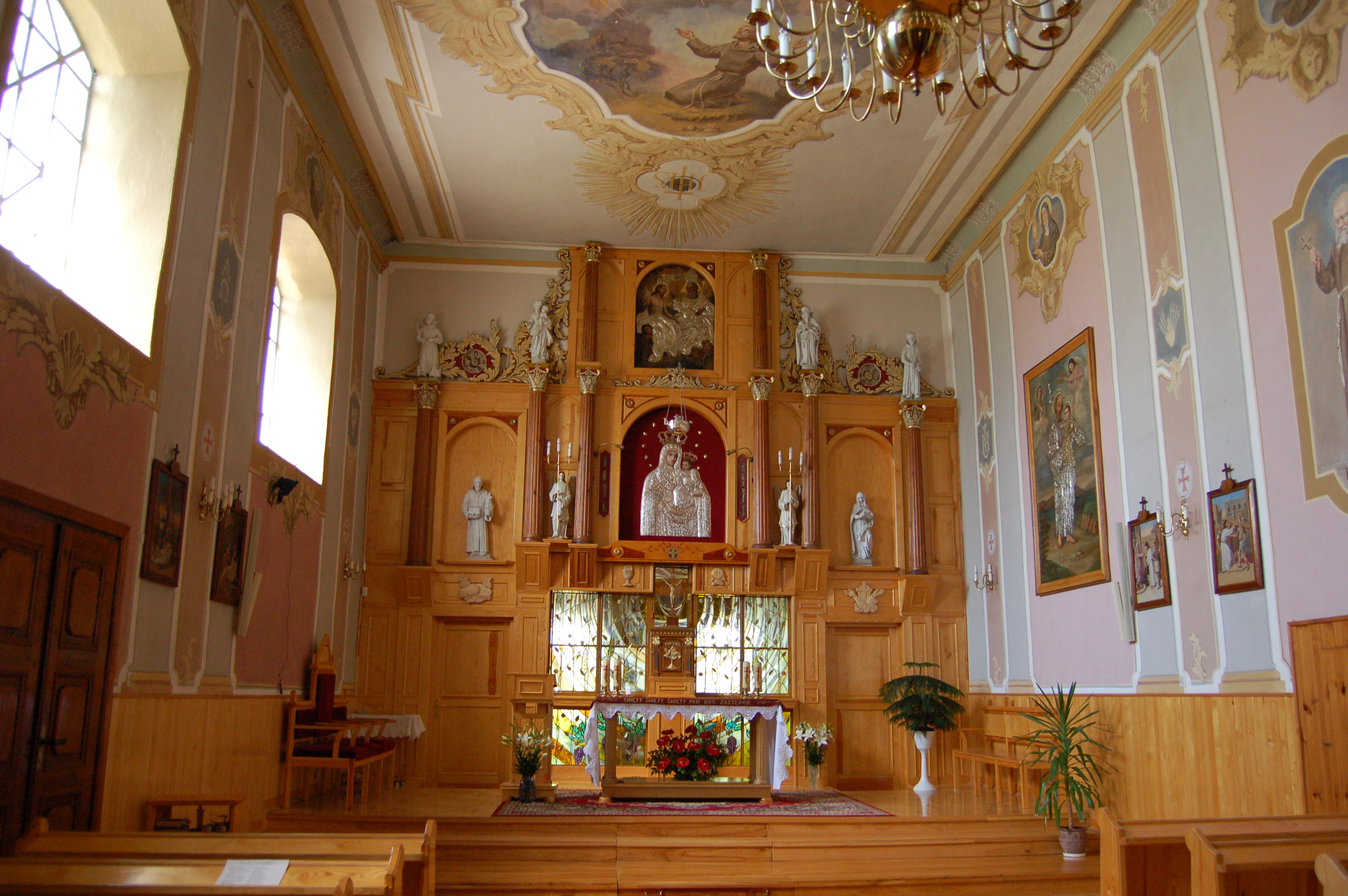 Przasnysz, kościół św. Klary i św. Józefa, 1609-1616, 1786-1789